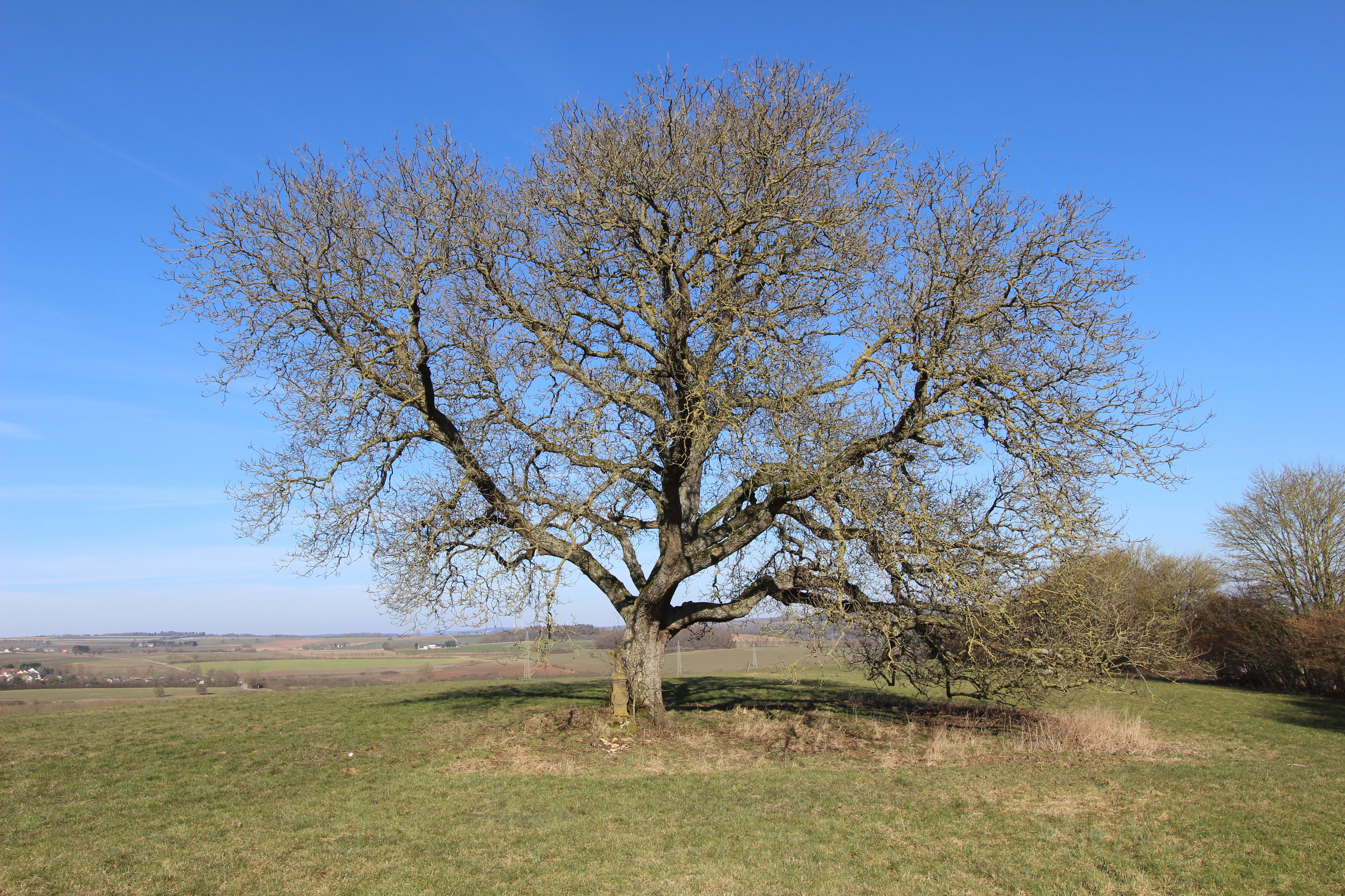 54634 Bitburg-Mötsch, auf der oberen Messenhöh. Wegekreuz unter einem alten Nußbaum aus dem ersten Viertel des 19. Jhr. Das einfache, beschädigte Kreuz wurde 1990 durch eines mit Korpus ersetzt. Aufnahme von 2018.